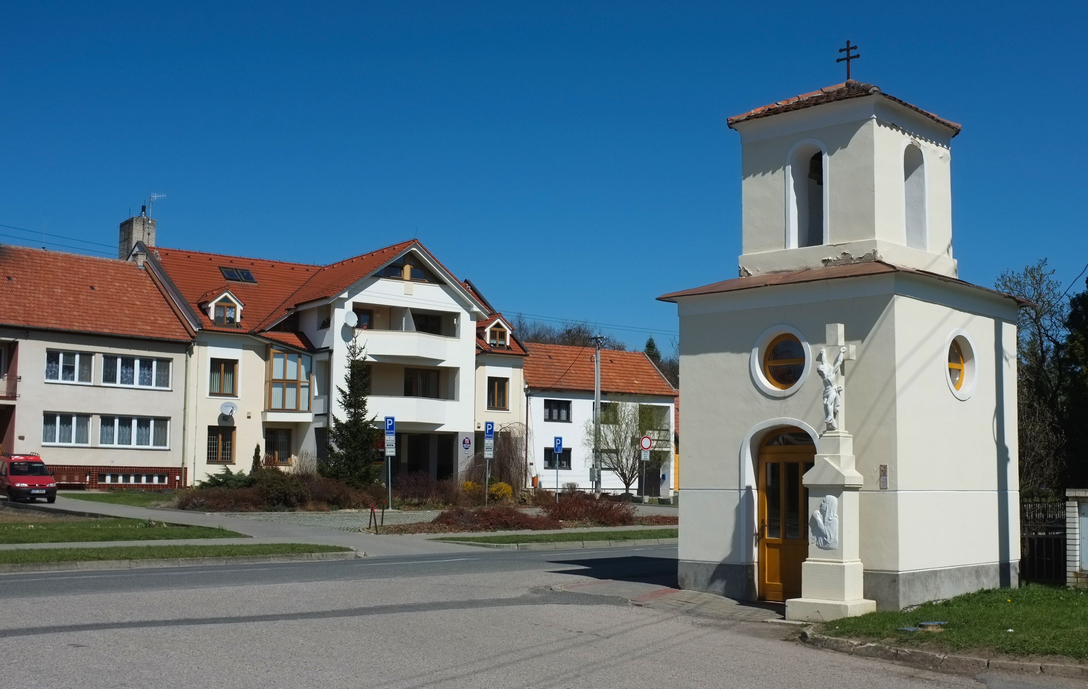 Kaple a radnice v Zahorovicich